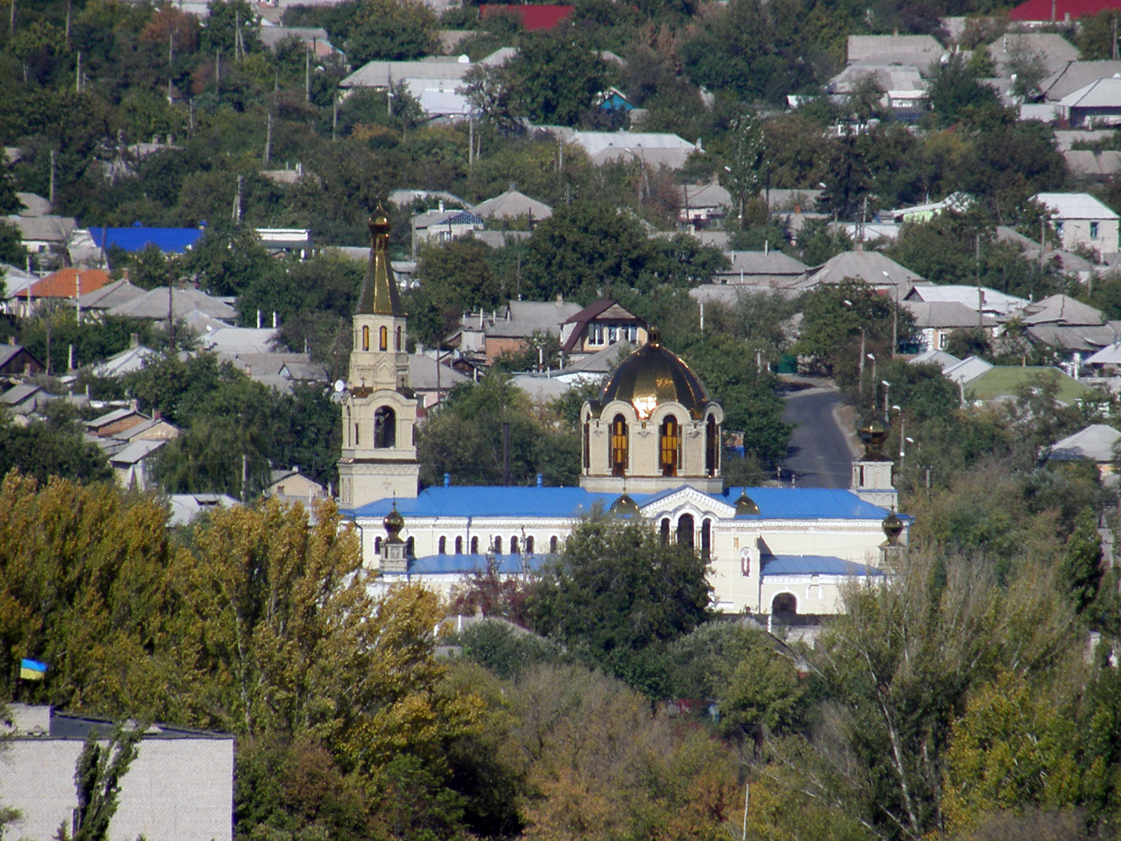 Луганск, Свято-Петропавловский кафедральный собор